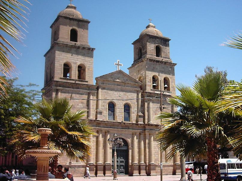 Catedral de San Bernardo (Catedral Metropolitana) This medium shows the protected monument with the number T/00-004 in Bolivia.